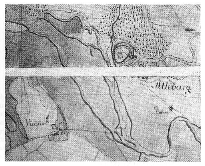 Plan Altenburgs aus der preußischen Landvermessung